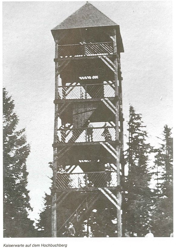 Kaiserwarte